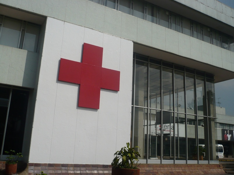 Instalaciones del Banco de Sangre ubicada en la sede principal Avenida 68. Bogotá,Colombia.